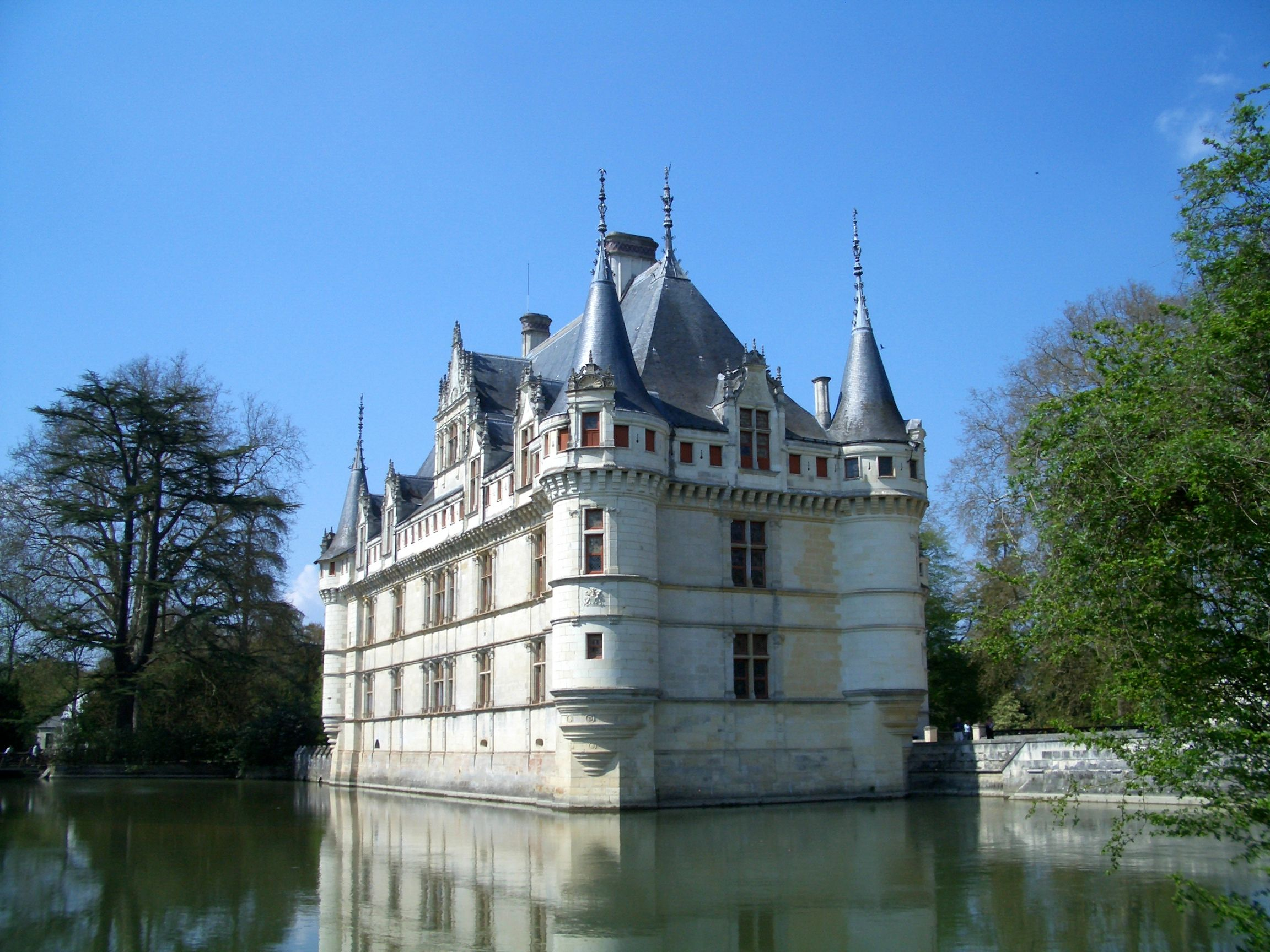 Vue générale avec les douves .